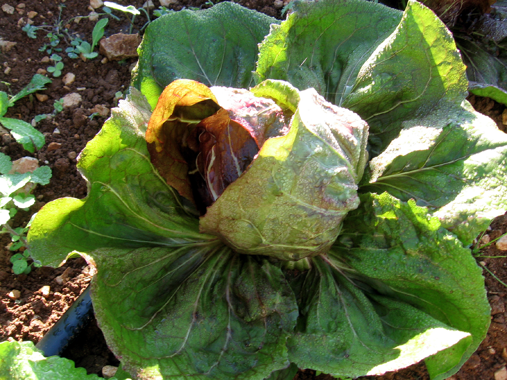 Radicchio Autore: Paolo Ciarlantini